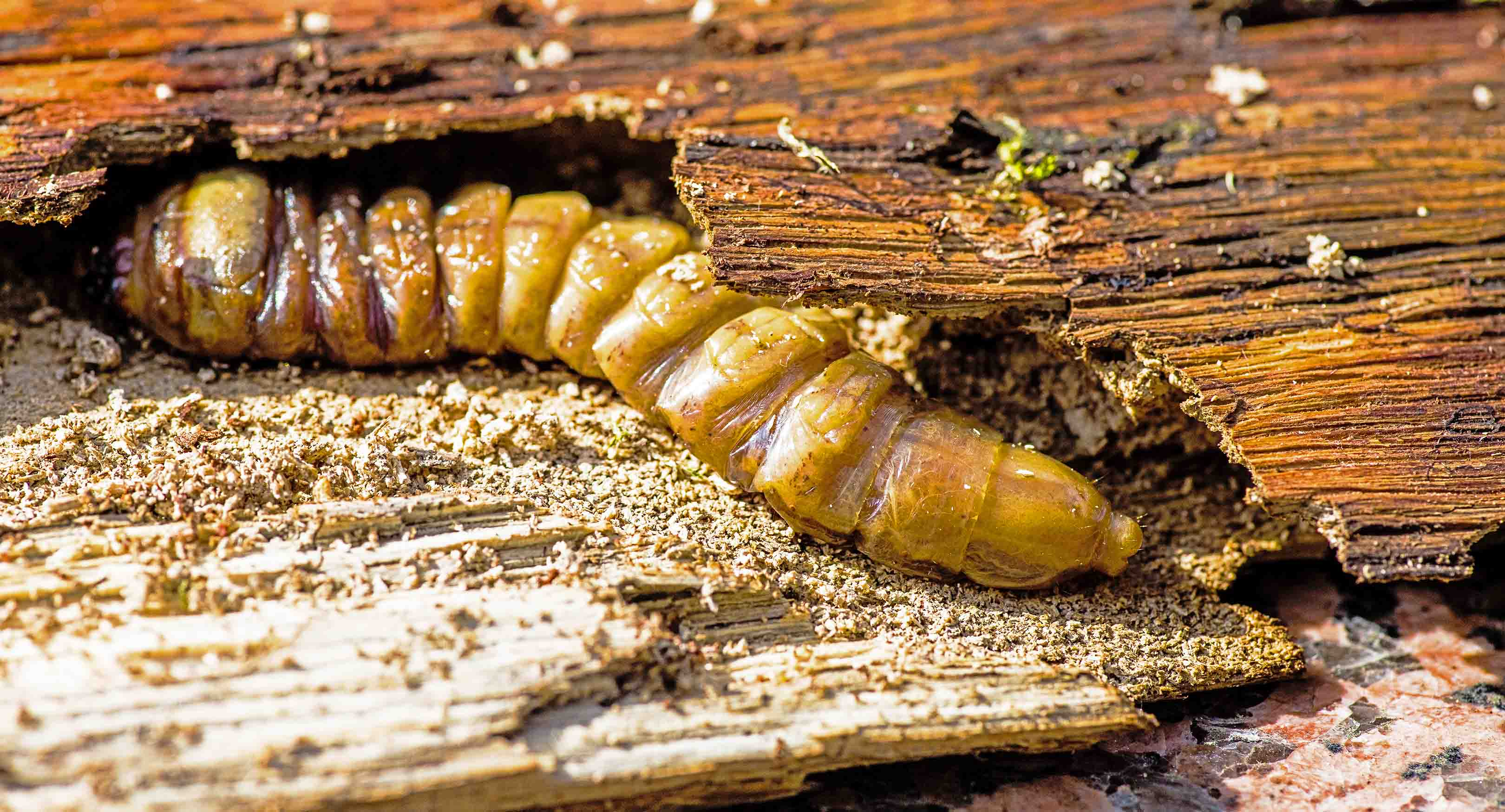 Larve des Eichen-Zangenbockes